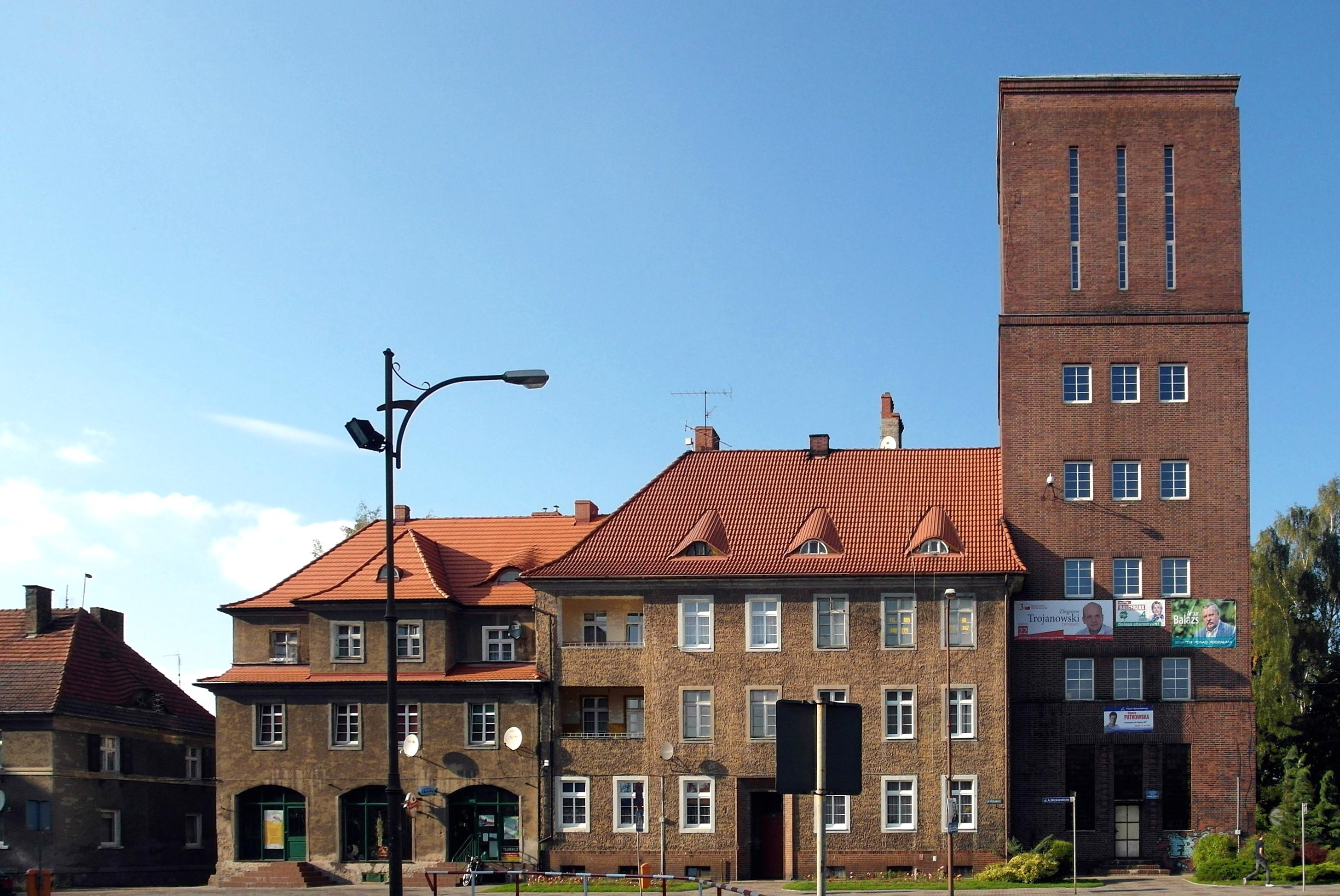 Dębno, ul. Mickiewicza 61 - wodociągowa wieża ciśnień (komunalna), 1928-1929